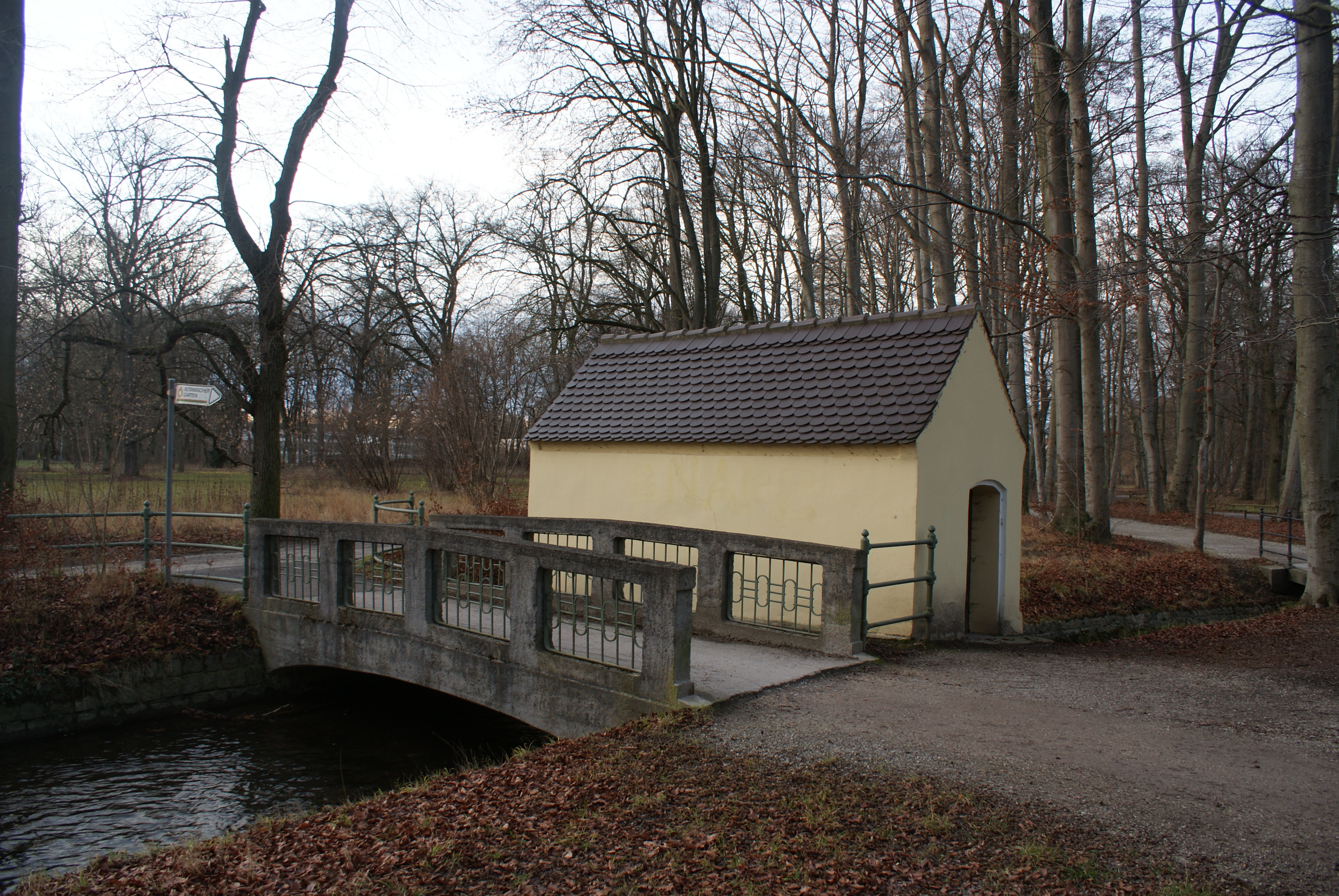 Brücke über den Siebenbrunner Bach in den Siebentischanlagen Augsburg